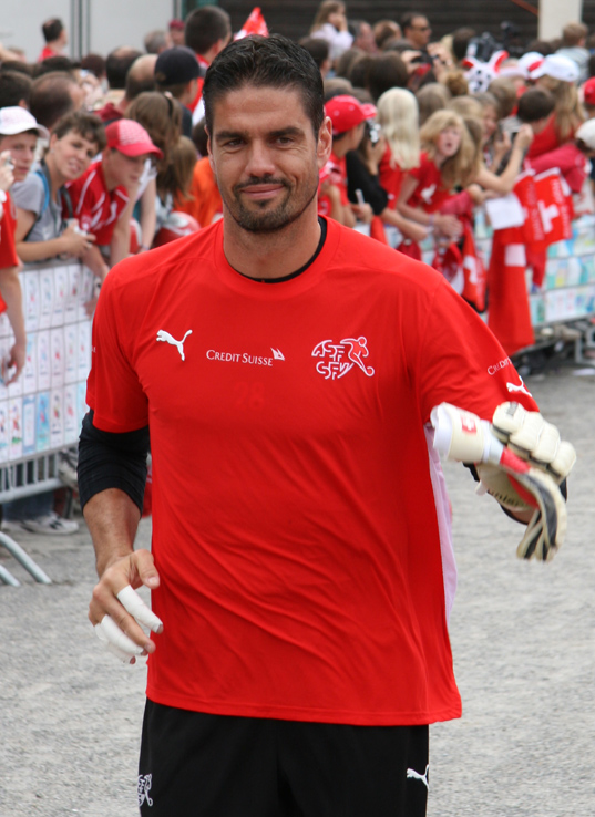 Pascal Zuberbühler im Trainingslager der Schweizer Fussballnationalmannschaft vor der Euro 2008